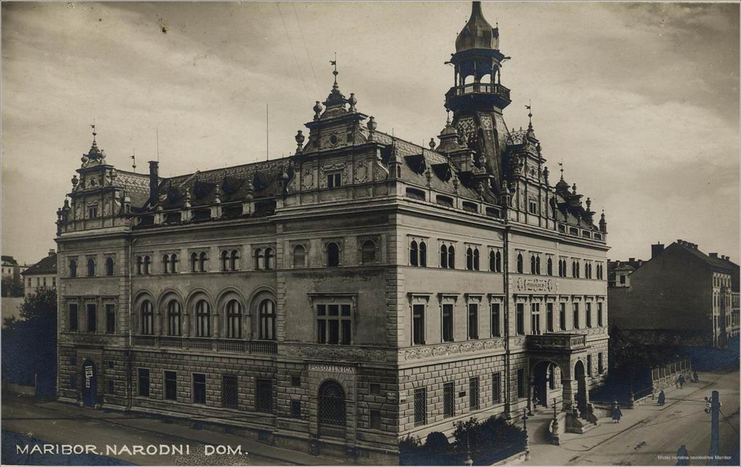 Razglednica Narodnega doma v Mariboru.